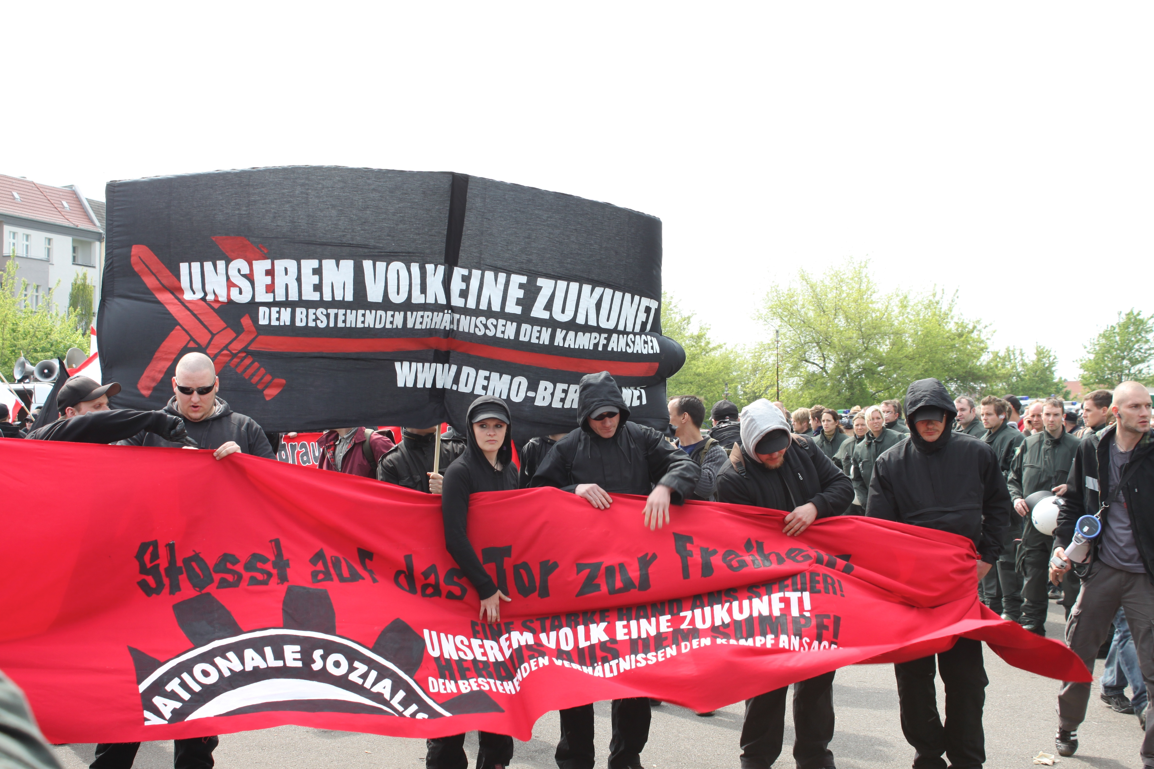 Rechtsradikale Nationale Sozialisten bei einer Kundgebung zum 1. Mai